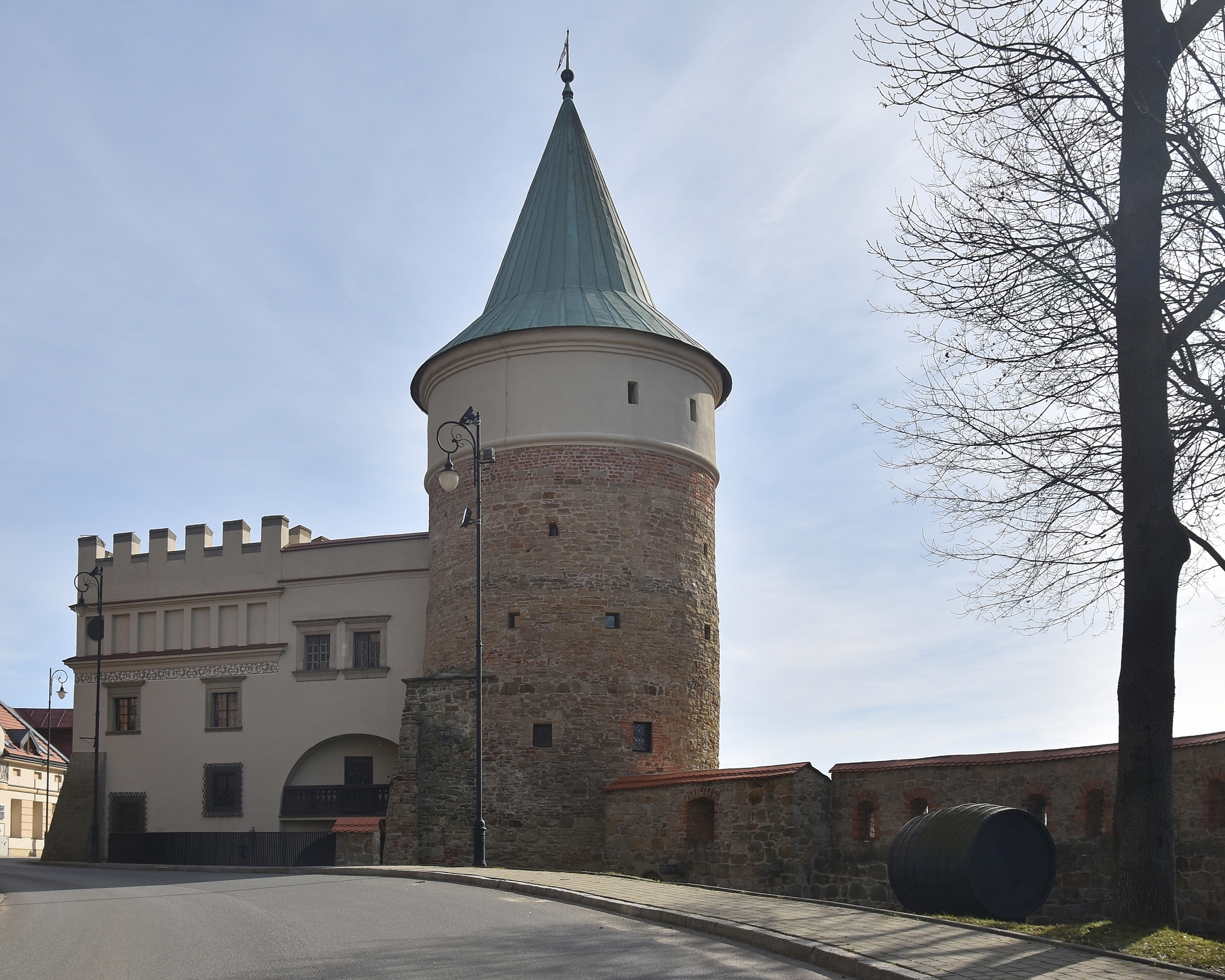 Biecz, Dom, XV/XVI